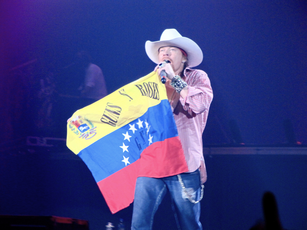 W. Axl Rose, Guns n´Roses Poliedro de Caracas 27 de Marzo 2010